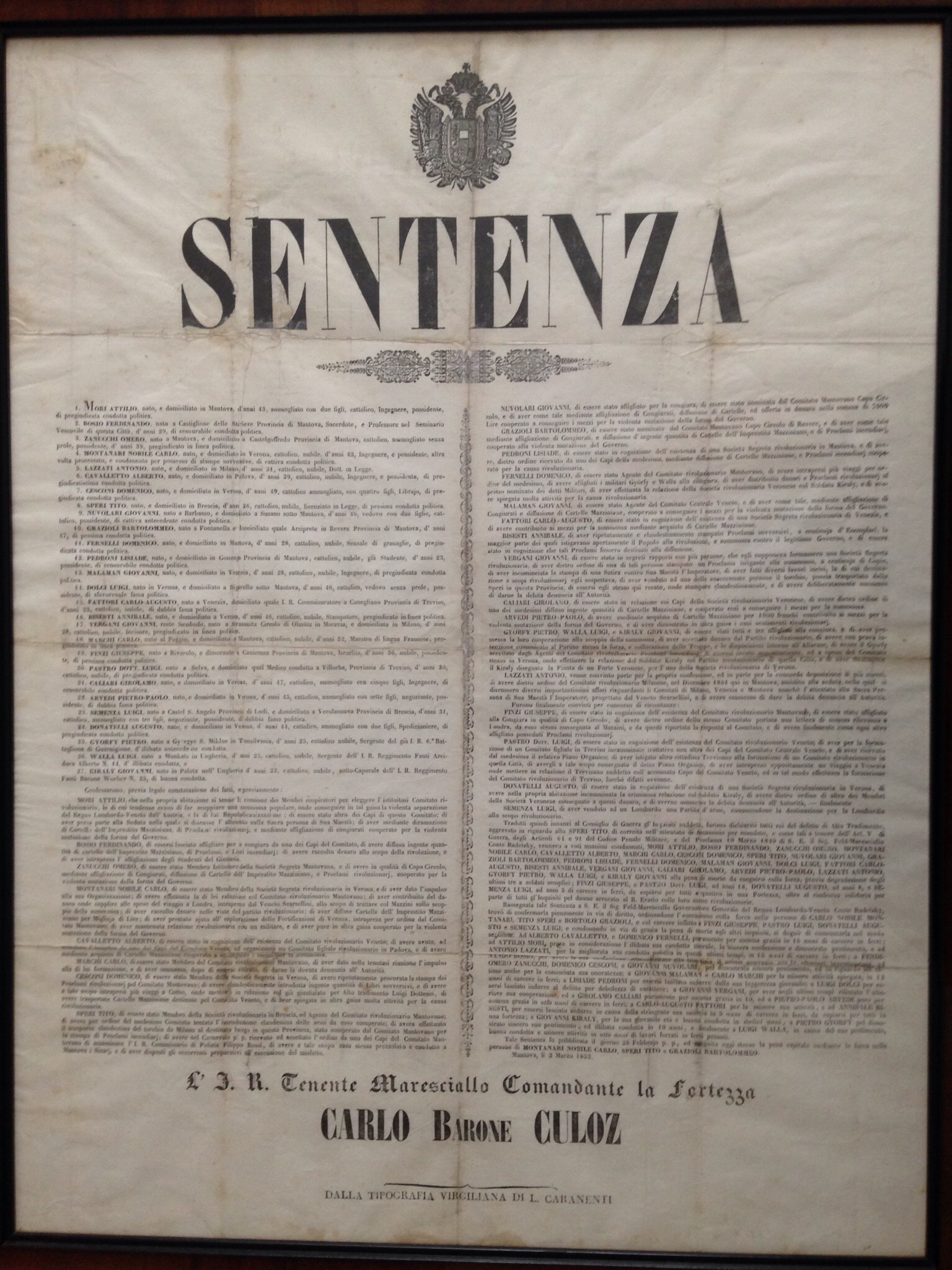 Editto originale Martiri di Belfiore